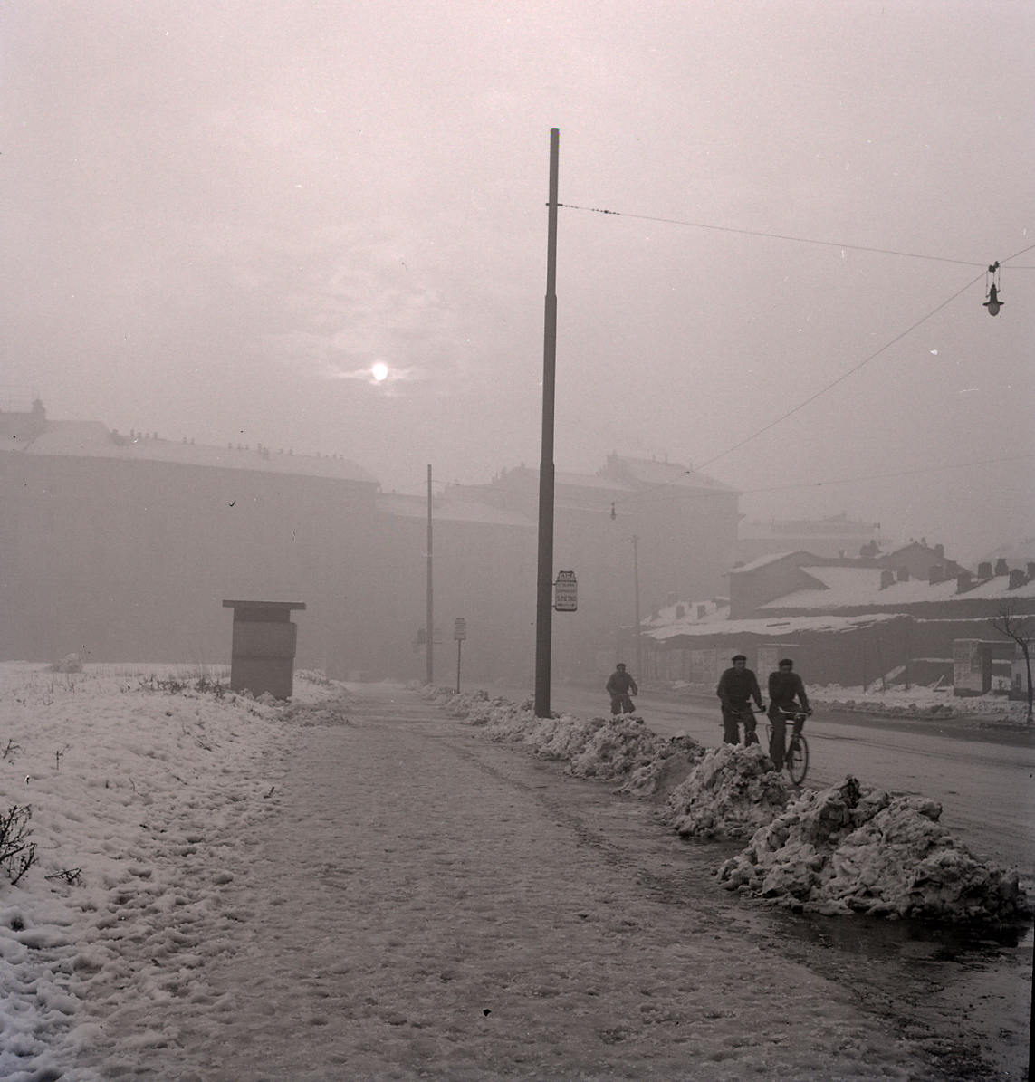 Serie fotografica : Milano, 1960 / Paolo Monti. - Buste: 29, Fototipi: 29 : Negativo b/n, gelatina bromuro d'argento/ pellicola ; 6x6. - ((Serie costituita da 29 negativi identificati con i nn.: 7272-7300. La suddetta serie è contenuta nella scatola identificata con la numerazione R7211-7428. Sul coperchio della scatola manoscritto: "Milano ". Sulla busta 7272 manoscritto: "Via Giotto". - Via Giotto